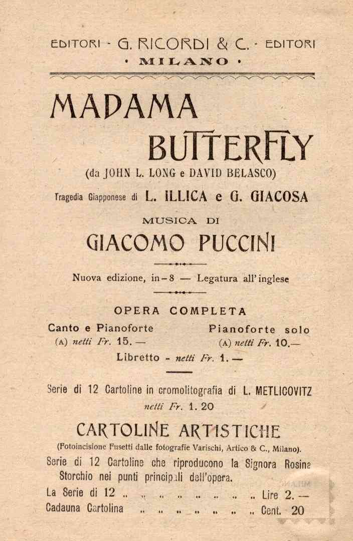 libretto Madama Butterfly dramma lirico in 4 atti musica di Giacomo Puccini - pagina dei prezzi dell'opera completa(da John L. Long e David Belasco) tragedia giapponese di L. Illica e G. Giacosa musica di Giacomo Puccini - pagina prezzi opera completa